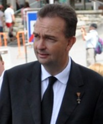 L’archiduc Charles d’Autriche.